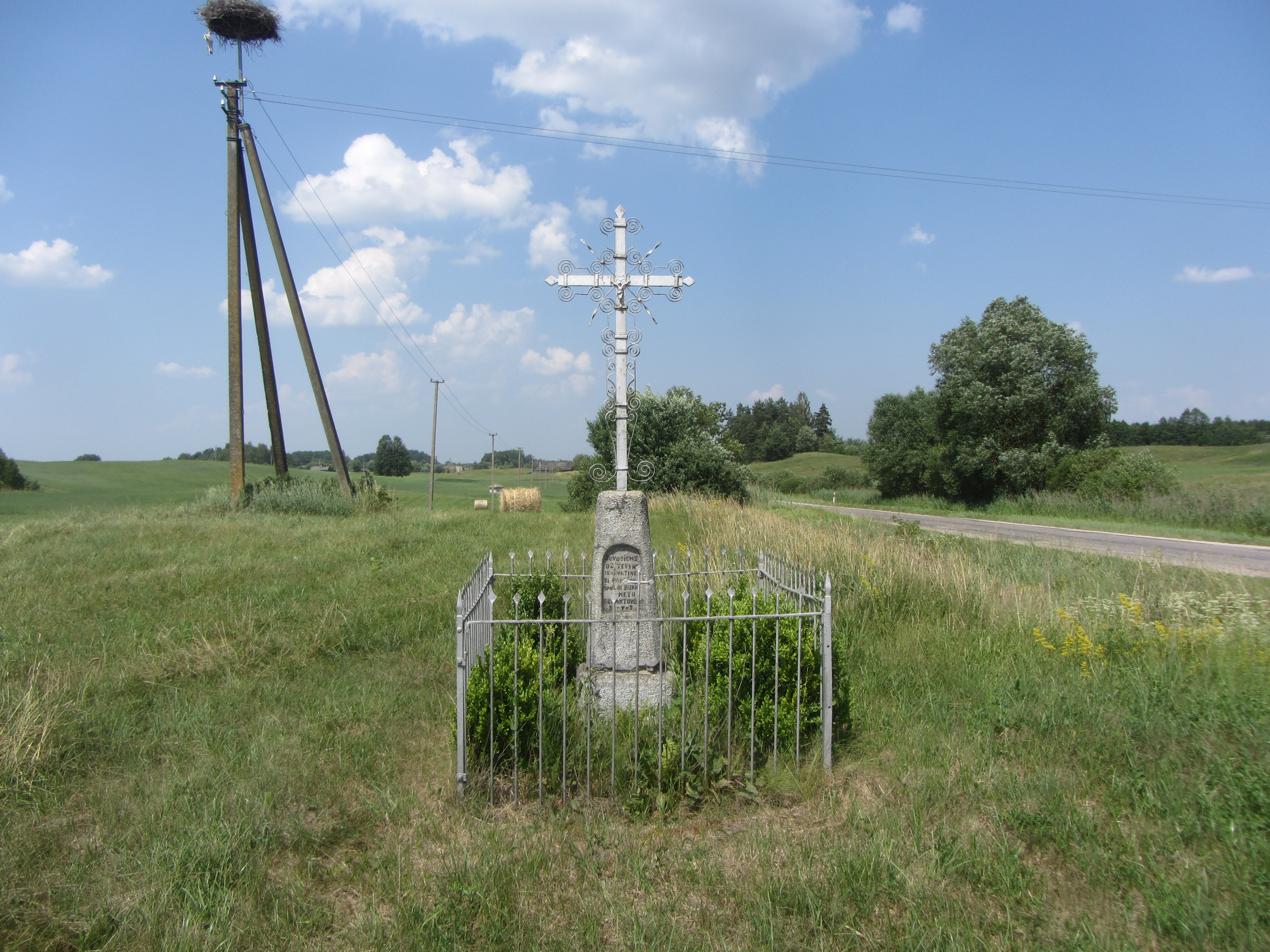 Teizų sen., Lithuania